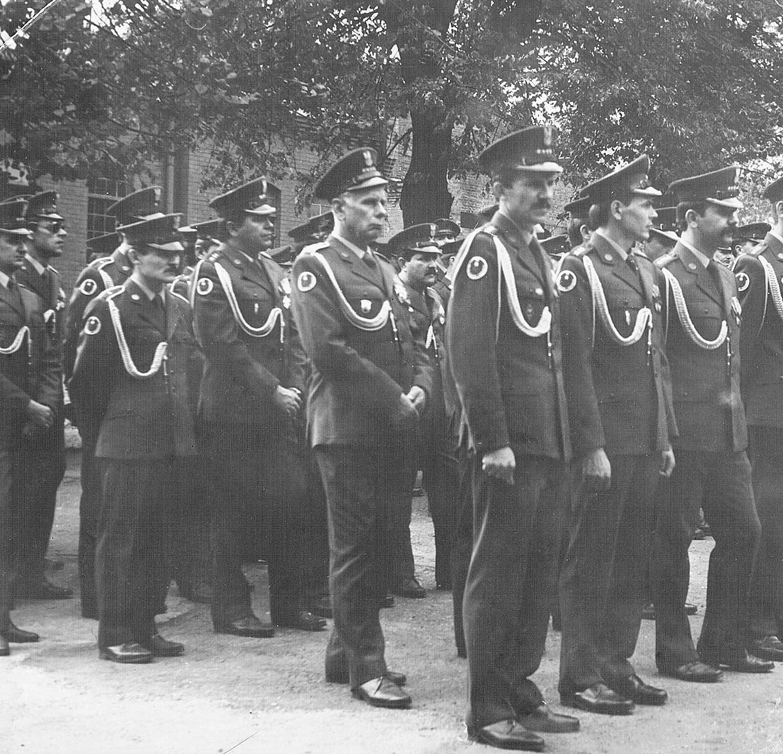 Kadra bg Prudnik, GPK Głuchołazy, Strażnicy WOP Pokrzywna i Strażnicy WOP Jasienica Górna, na placu apelowym podczas uroczystej zbiórki z okazji Święta Ludowego Wojska Polskiego - batalion graniczny WOP Prudnik.